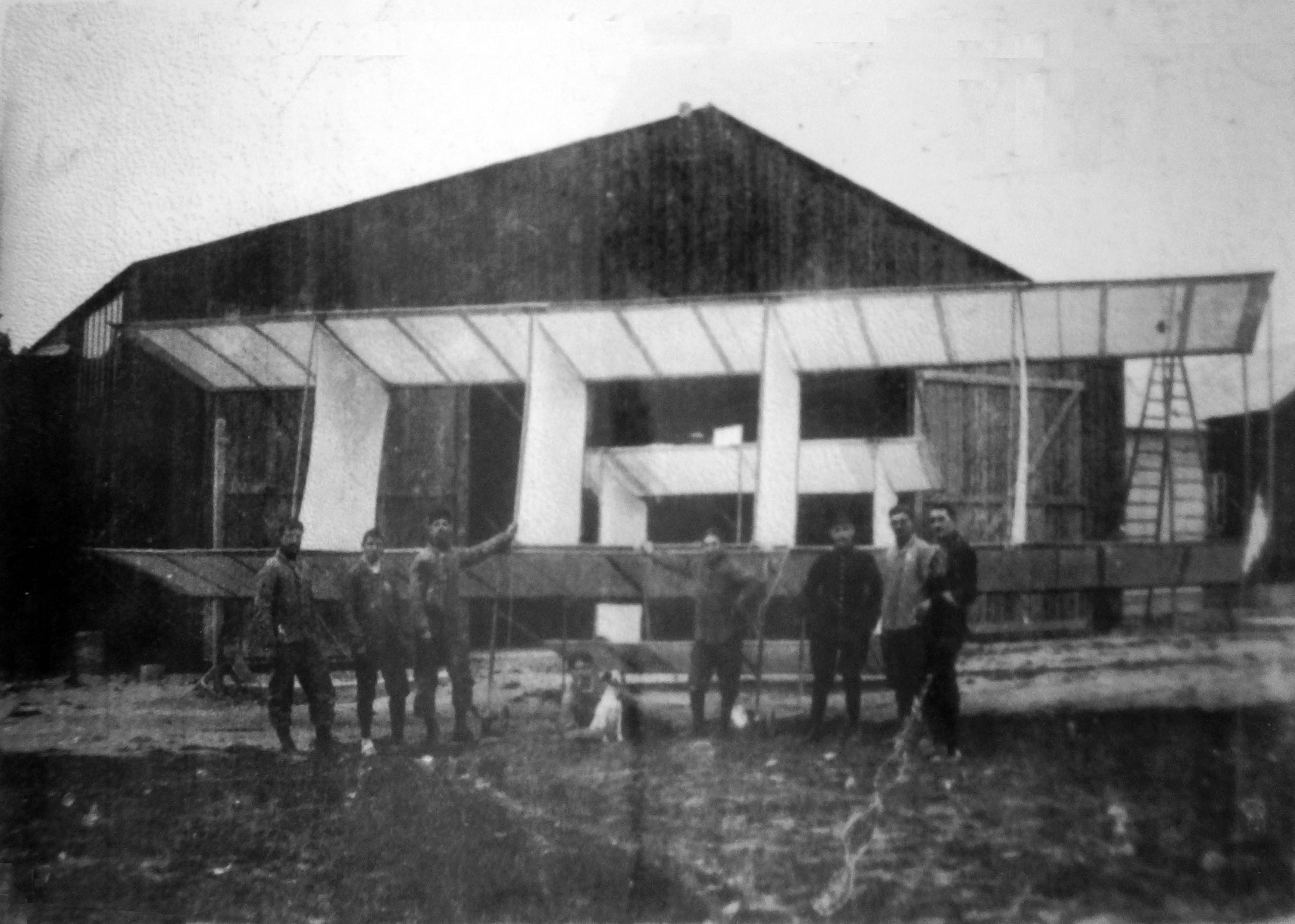 Planeur_Saconney_en.